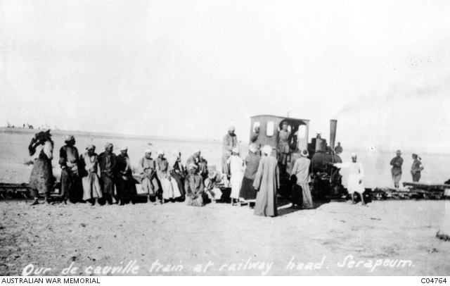 Our decauville train at the railway head. Serapeum (AWM C04764)